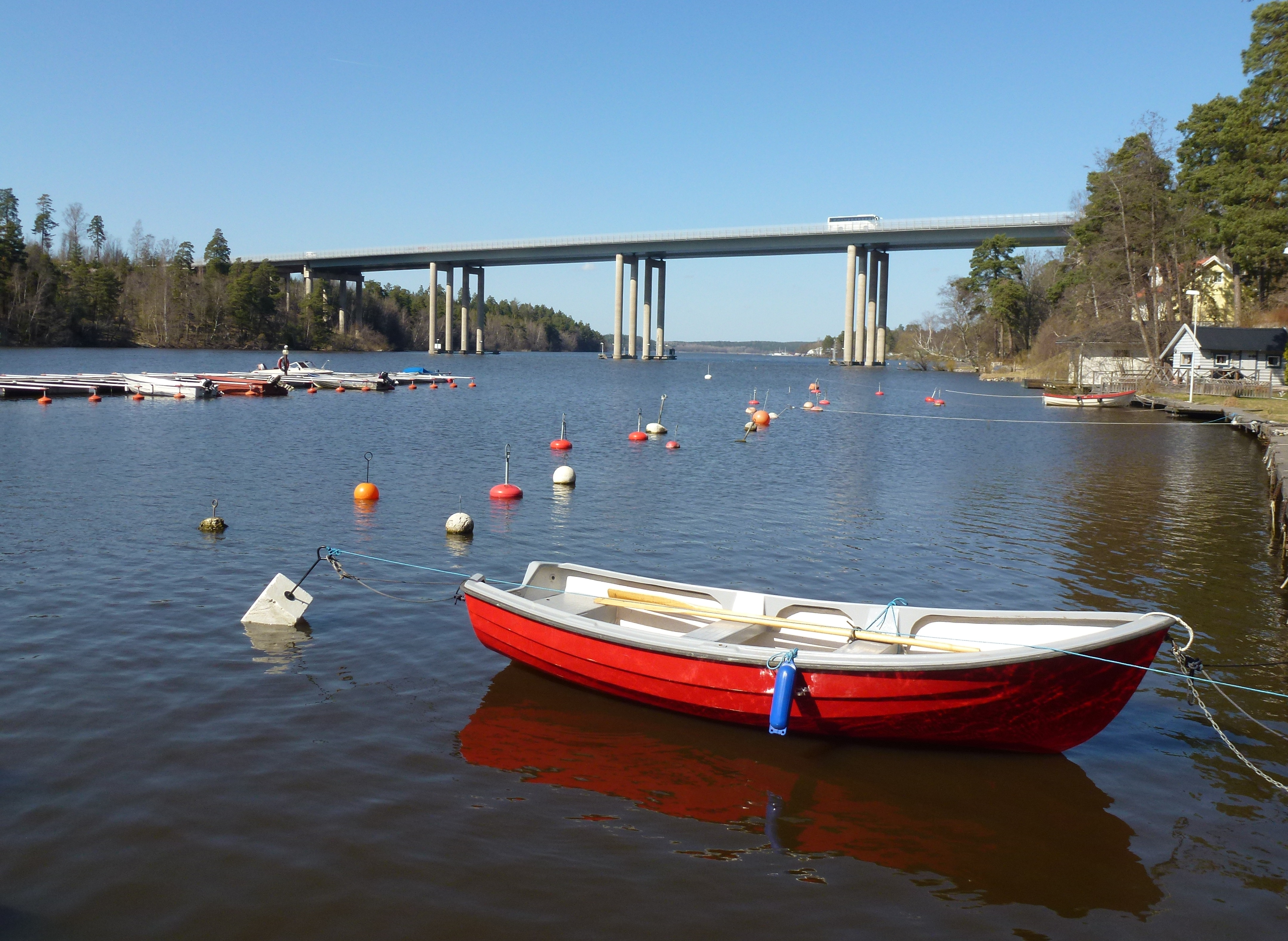 Stäksundet och Stäketbron (motorvägsbron E18)